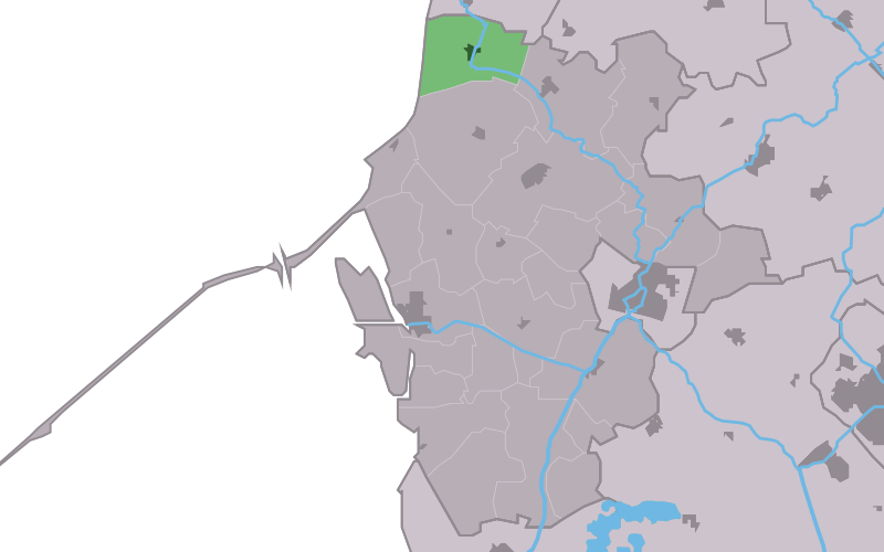 Kaartsje fan himrik fan Kimswert